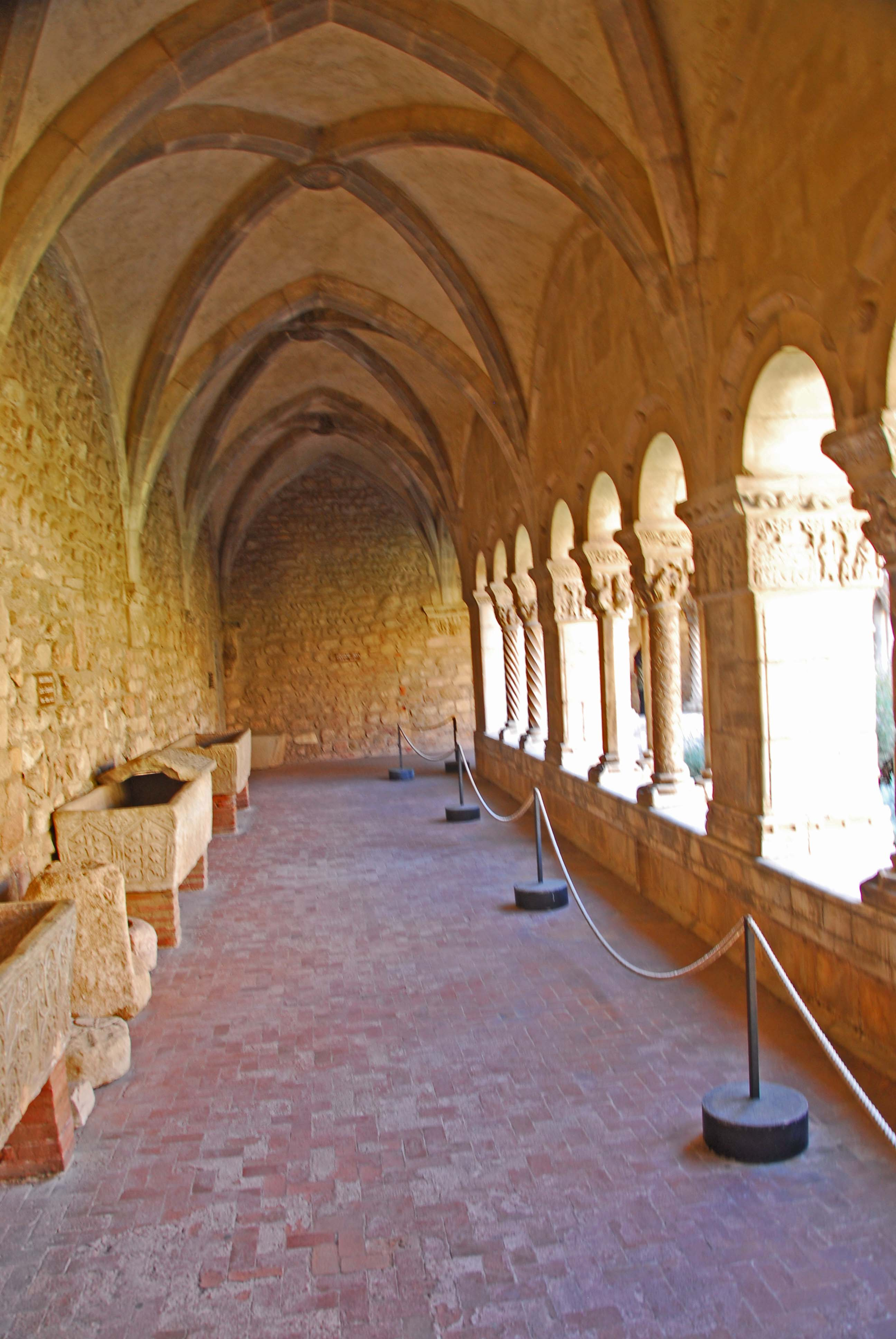 Ste-Eulalie-et-Ste-Julie_d’Elne, Kreuzgang, Südgalerie, von O